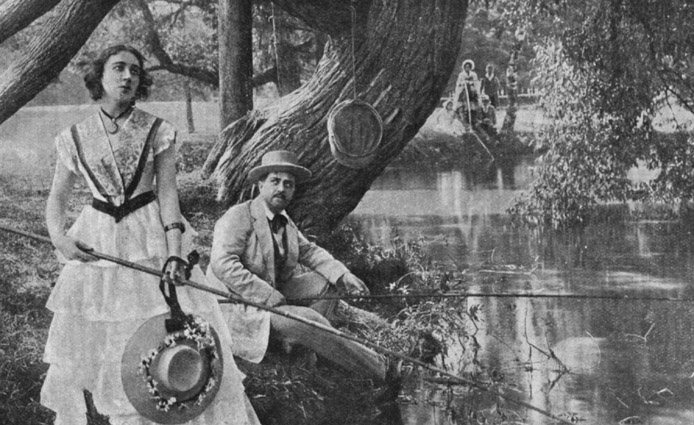 Кадр из фильма «Дворянское гнездо» (1914). Ольга Преображенская в роли Лизы, Михаил Тамаров в роли Лаврецкого